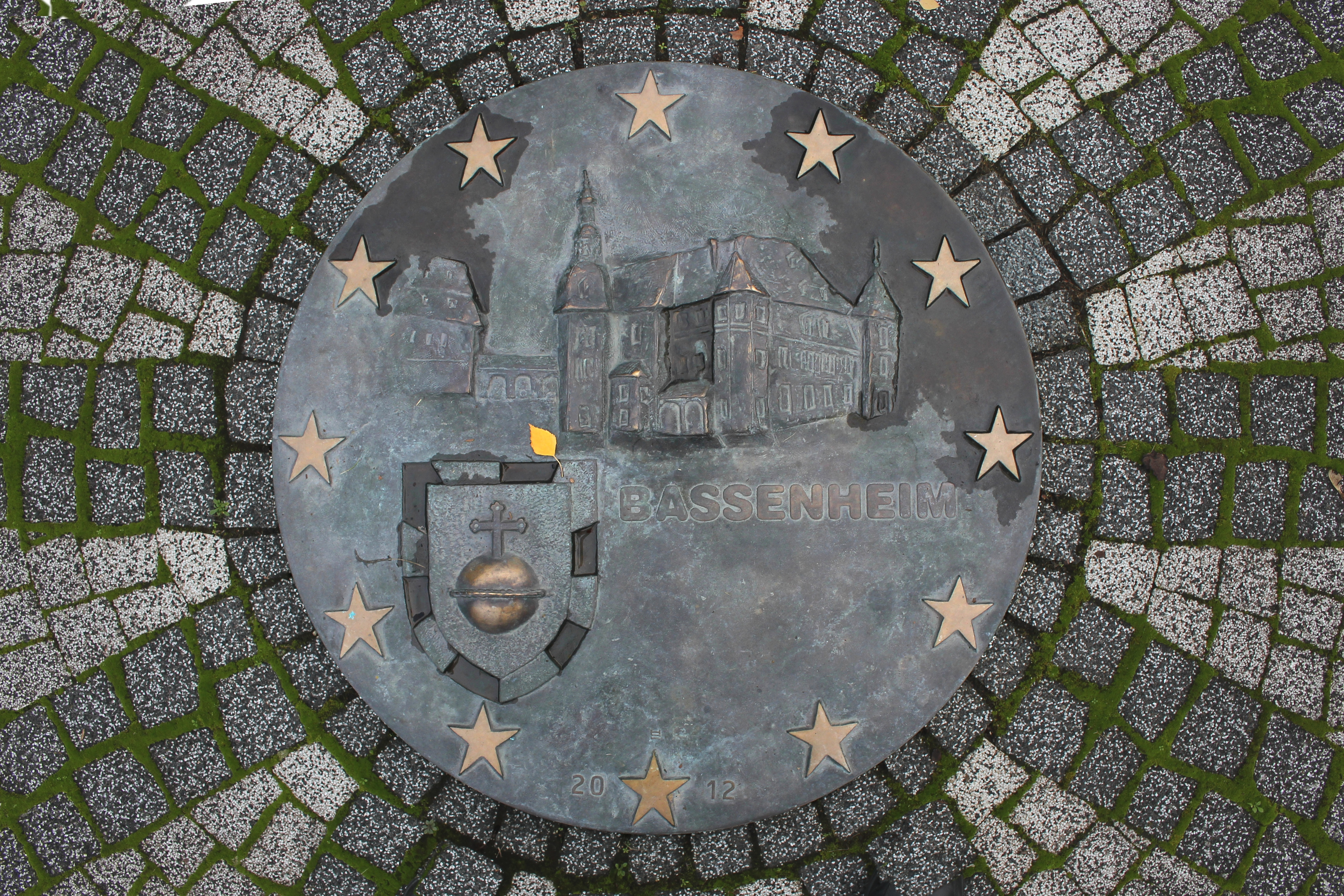 Plakette im Adenauer-Schuman-Gedenkzeichen von Harald Stieding (* 1940) in Bassenheim, eingeweiht am 17. Juni 2012. Das Denkmal erinnert an das Treffen von Konrad Adenauer und Robert Schuman am 8. Oktober 1948 in der Burg von Bassenheim. Diese Begegnung gilt als Anfang und Grundlage der späteren deutsch-französischen Freundschaft. Die zwölf Stelen auf zwölfeckigem Grund versinnbildlichen die Gesamtheit der europäischen Länder.